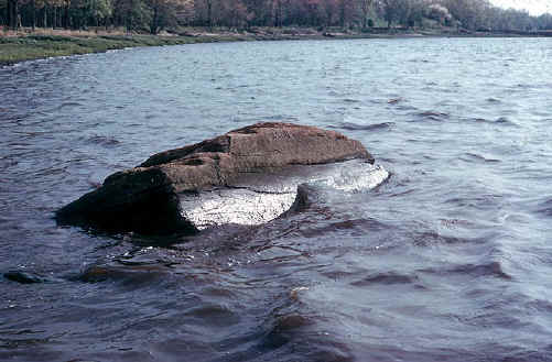 Descrição: A Pedra de Dighton no Rio Taunton, até ser removida para o Museu en 1963, pesa 40 toneladas! Fonte/Créditos: Fotografias Imagens ilustrações do usuário registrado. (Não protegidos por copyright). Igualmente provenientes da minha Webpage " Les Photos du Grand-Lancy " " À la Découverte du Monde..." (Não protegidos por copyright). Licença: (Não protegidos por copyright). JM 22:03, 22 Outubro 2005 (UTC)